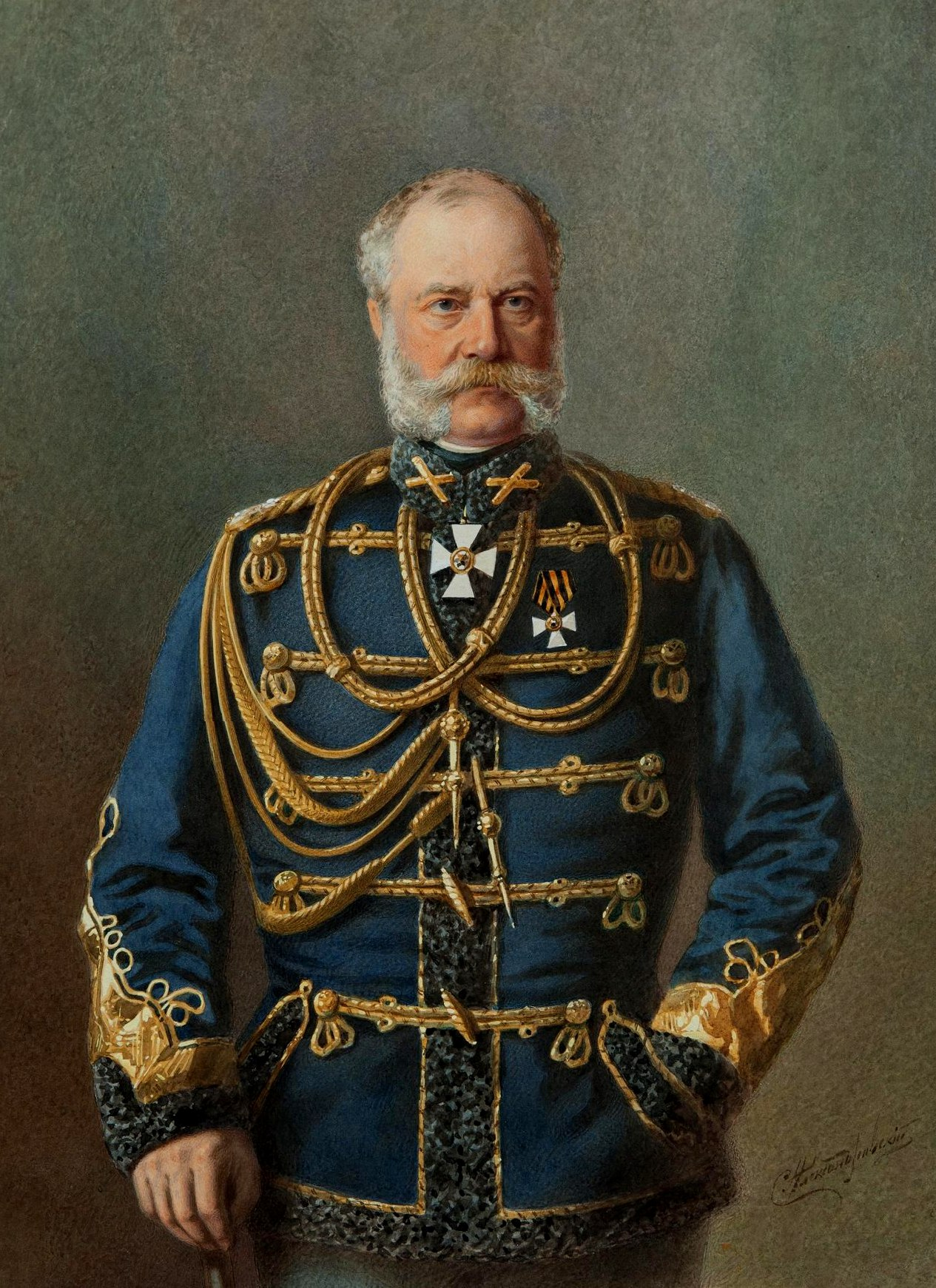 Портрет генерал-фельдмаршала князя Александра Ивановича Барятинского